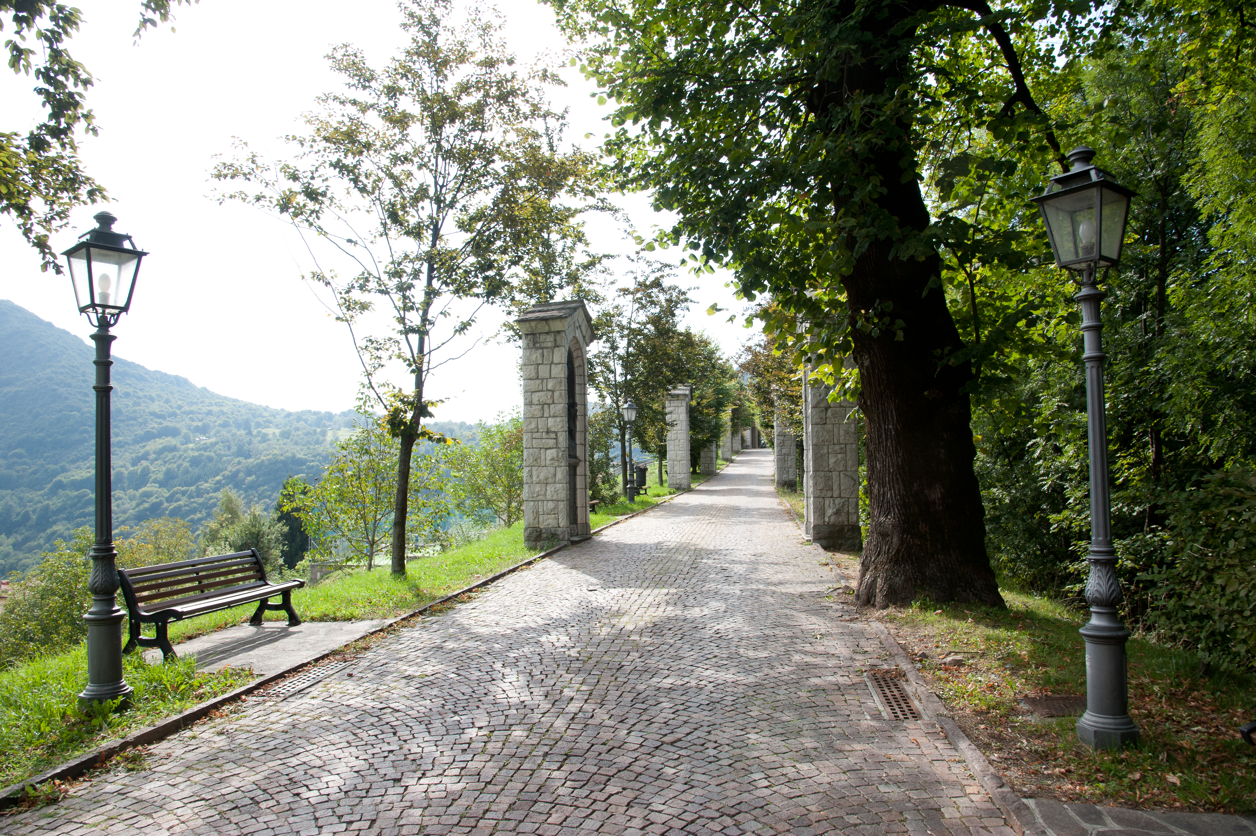 Via Crucis dello scultore Michele Vedani This is a photo of a monument which is part of cultural heritage of Italy.